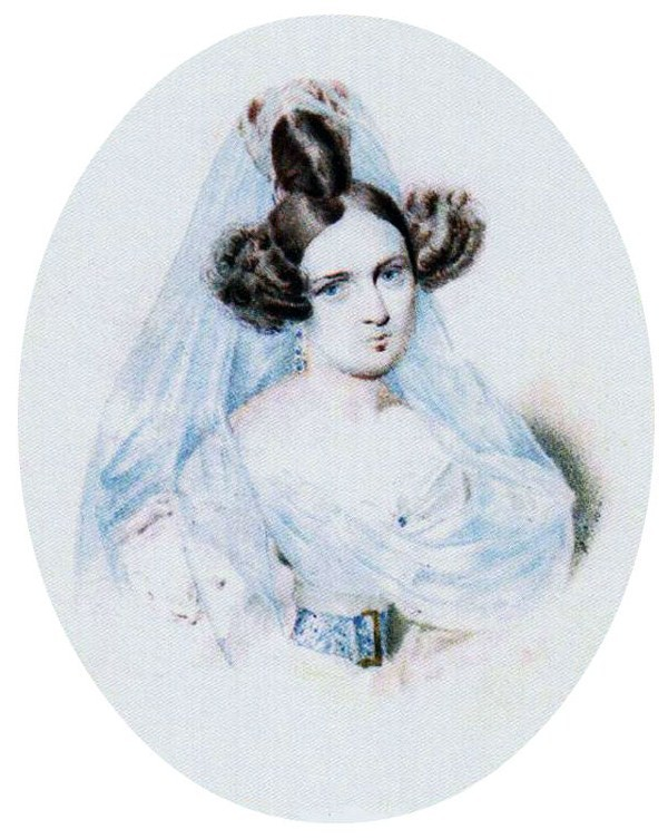 Александра Андреевна Оленина, ур. Долгорукова (1807 - 18.12.1859), дочь князя А.Н.Долгорукова (1772-1834) и Е.Н.Салтыковой (1777-1855). С 1833 года жена Алексея Алексеевича Оленина (1798-1854), сын А.Н.Оленина.